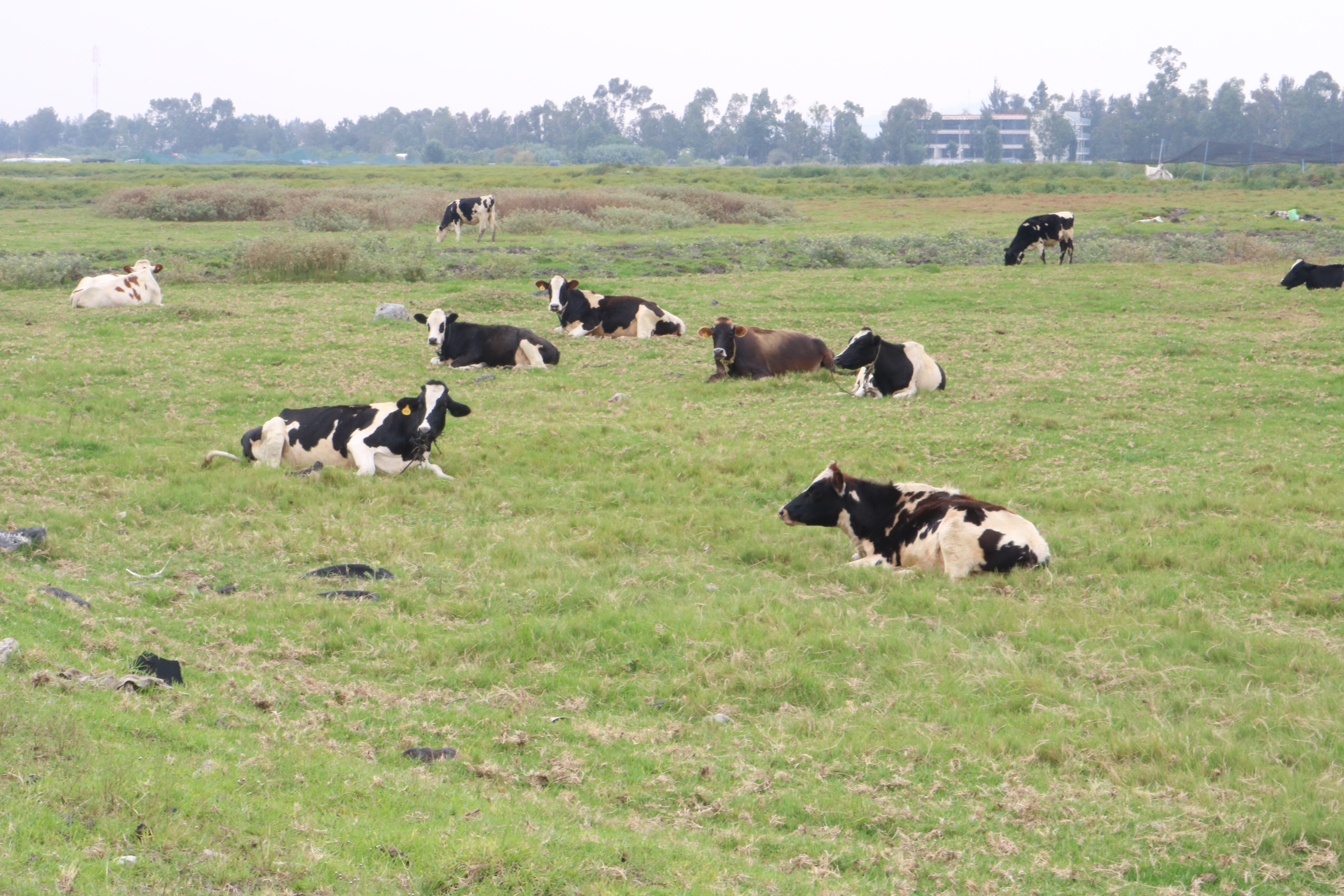 Ganando descansando en pastizal en el Conservatorio Natural de la zona de Chinampas, Xochimilco.